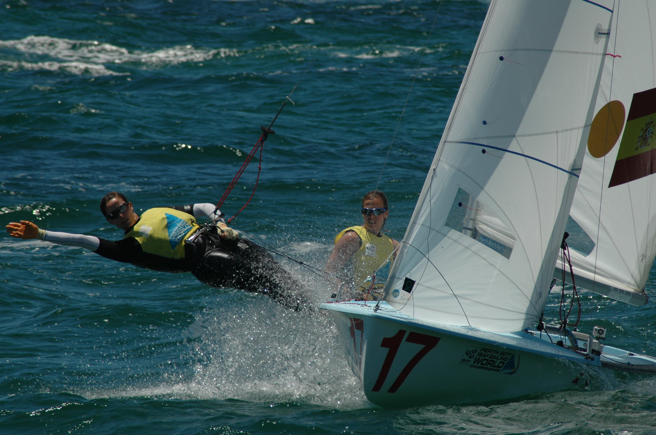 Equipo español de la clase 470 en el Mundial de Perth en 2011 formado por Berta Betanzos y Tara Pacheco.